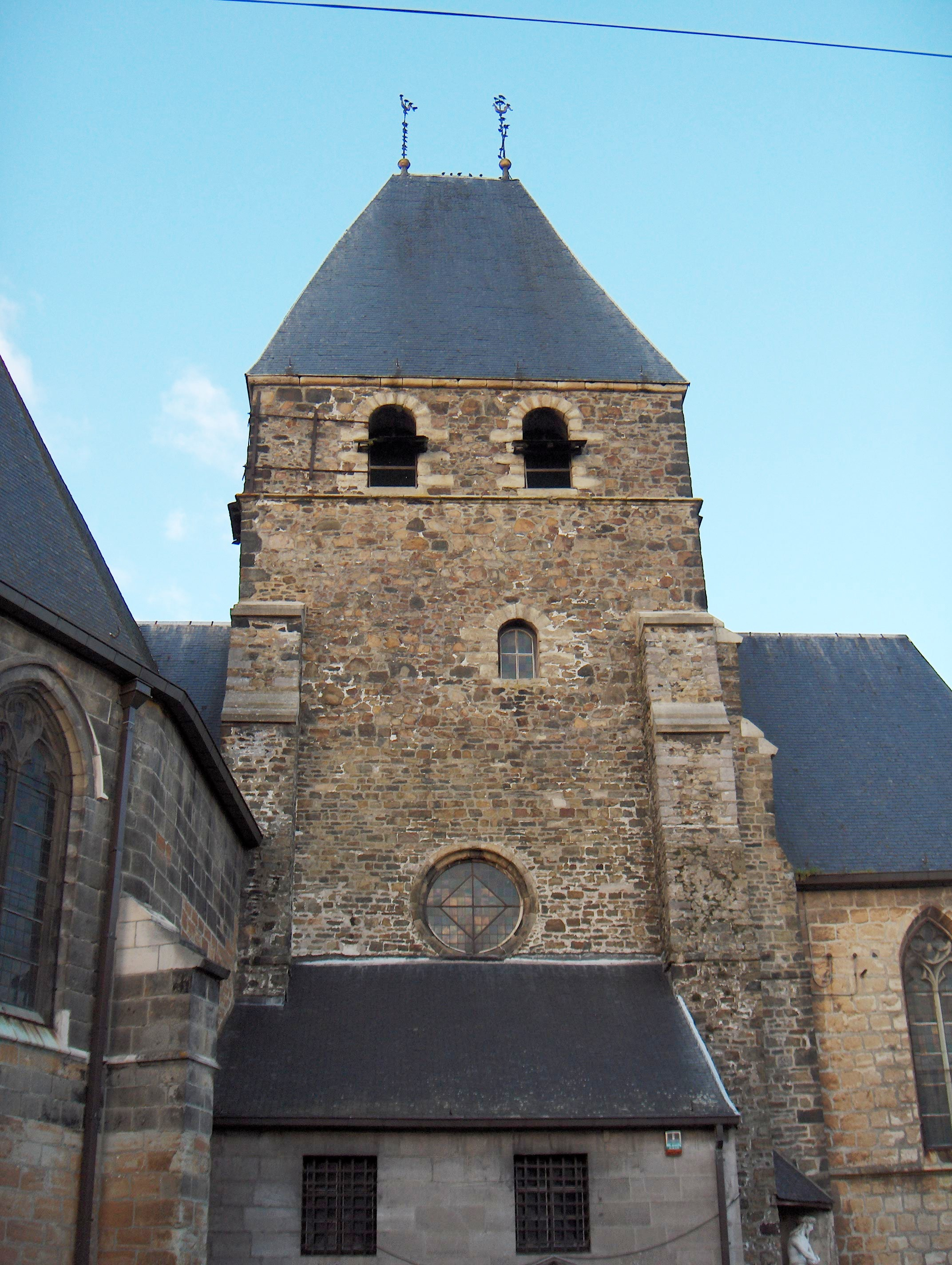 Martinikirche zu Deux-Acren (Belgien, Prov. Hennegau), romanischer Turm (12. Jh.)